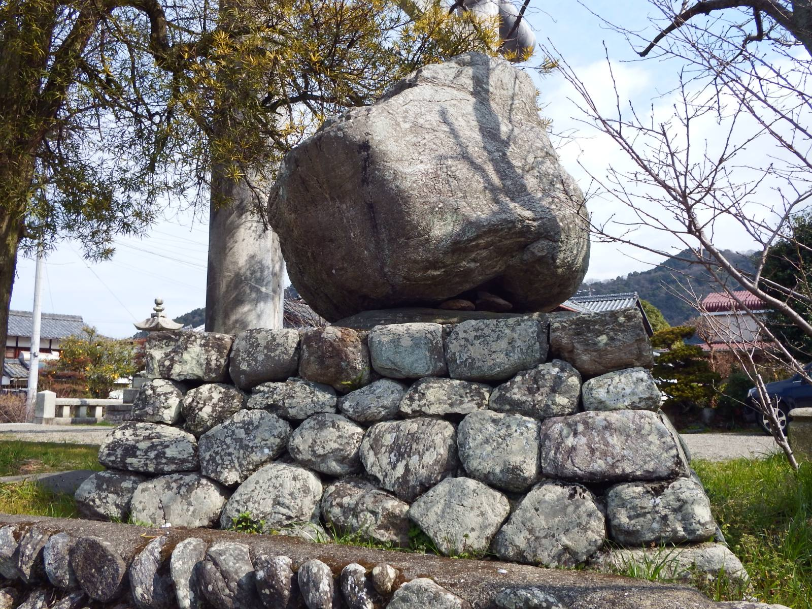 伊曽乃神社の投げ石